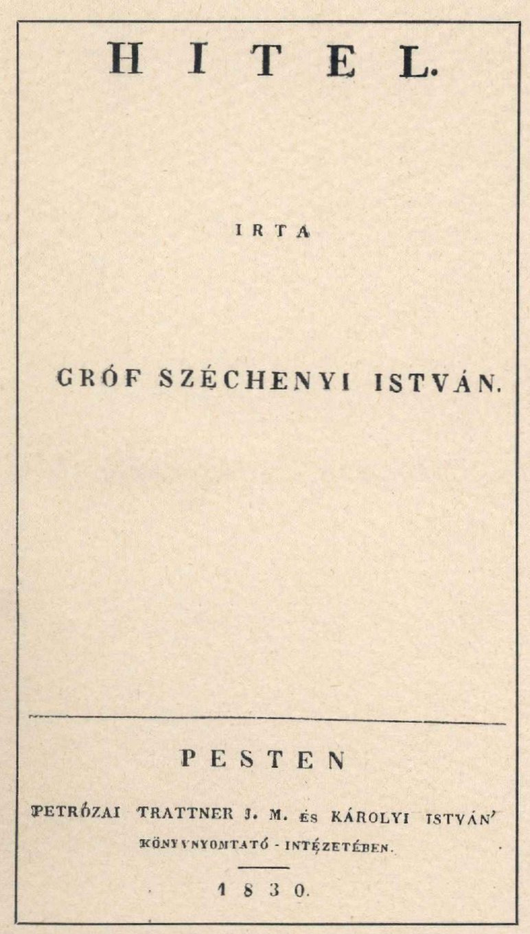 Széchenyi István a Hitel címlapja